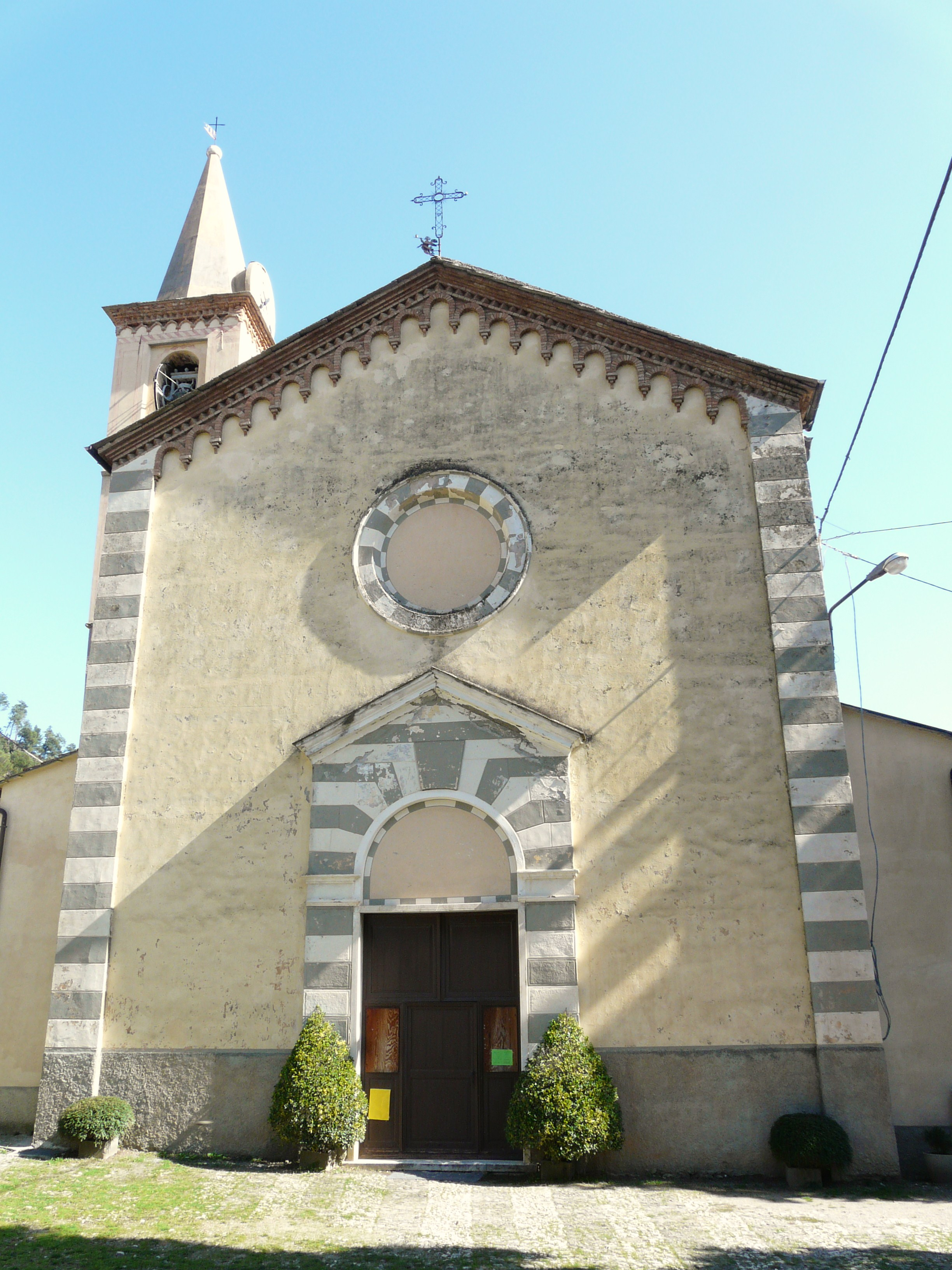 Chiesa di San Silvestro, Ortovero, Liguria, Italia